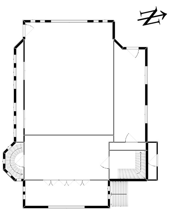 Grundriss der Barmer Lutherkirche